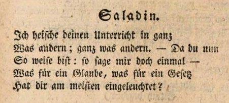 Gotthold Ephraim Lessing: Nathan der Weise, Erstdruck 1779, 3. Aufzug, 5. Auftritt, S. 125 Frage Saladins an Nathan, der mit der Ringparabel antwortet.